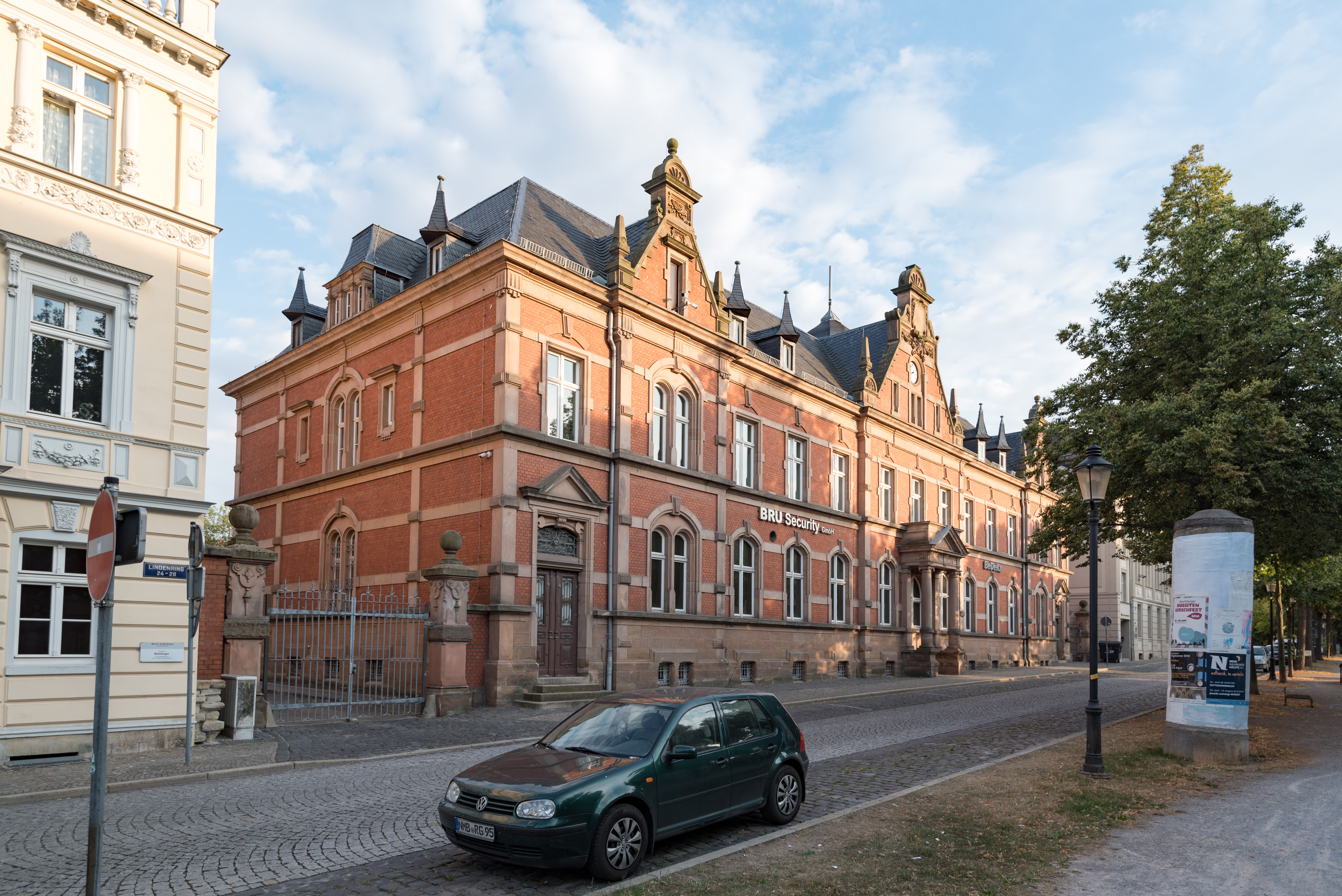 Naumburg (Saale), Lindenring 21-4